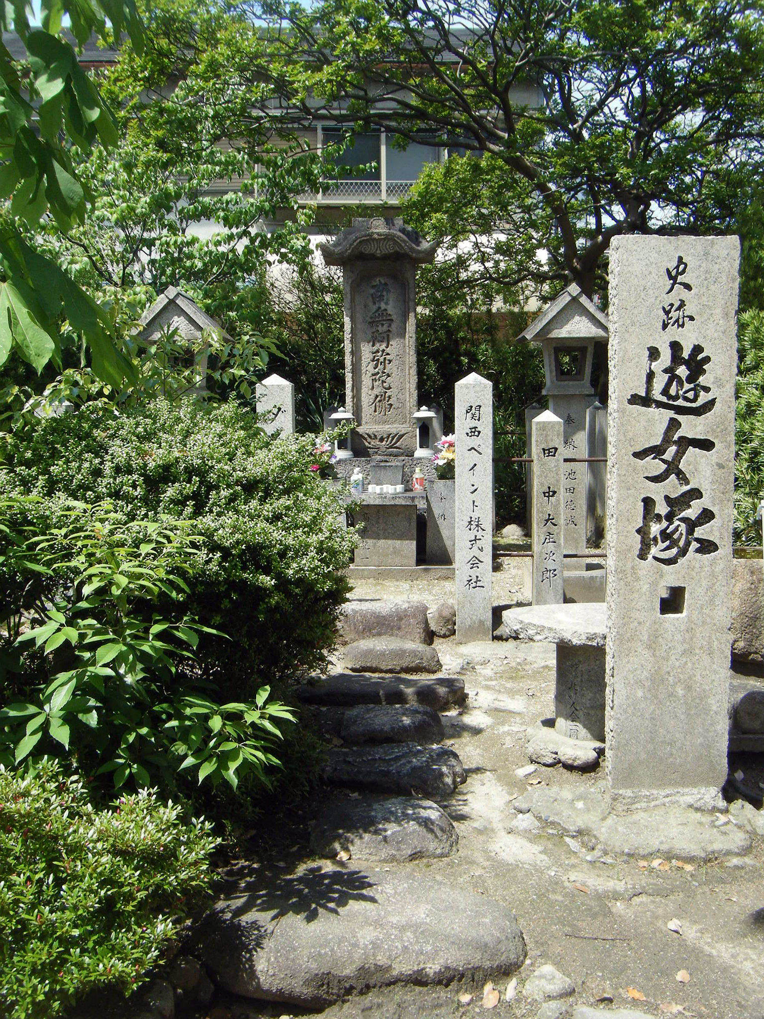 神崎遊女塚 梅ヶ枝公園 兵庫県尼崎市